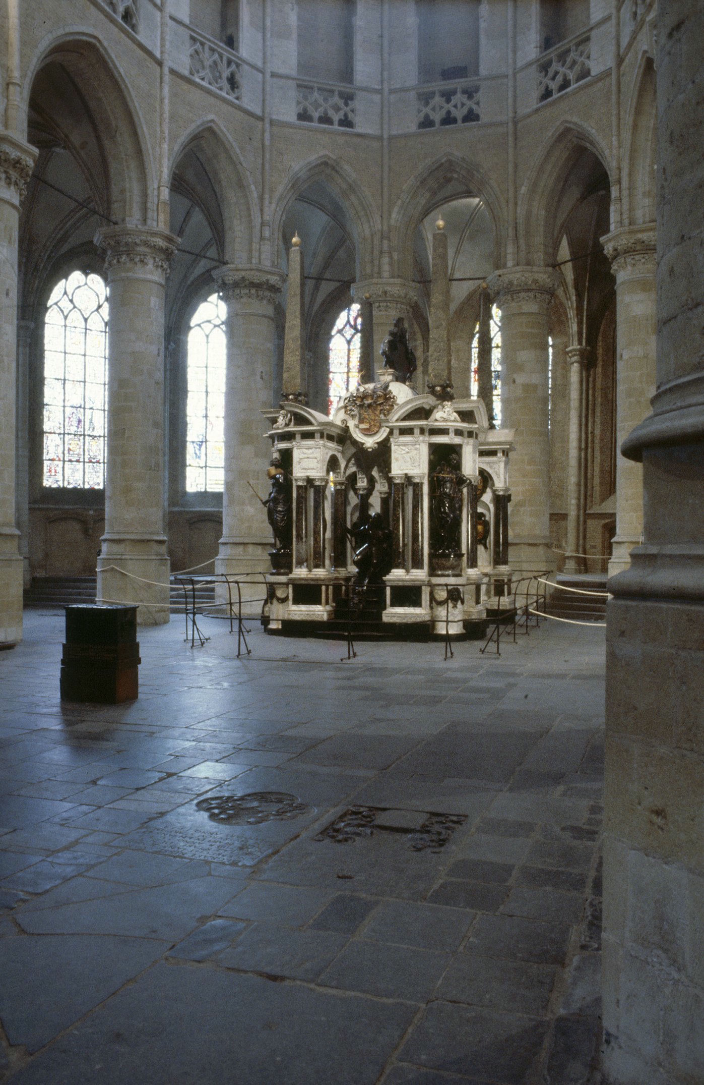 Nieuwe Kerk: INTERIEUR, GRAFMONUMENT PRINS WILLEM I, OVERZICHT